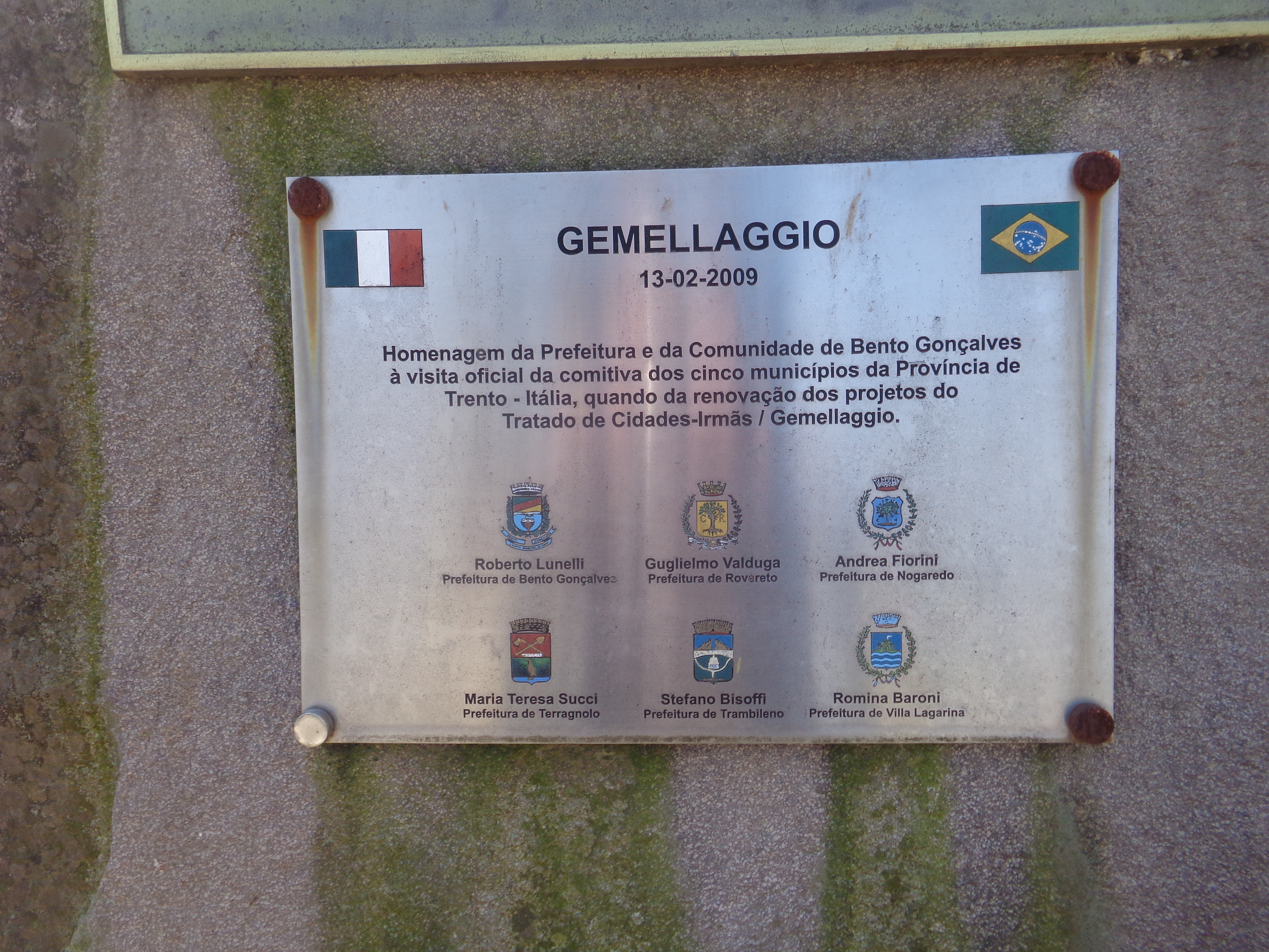 Placa comemorativa das cidades irmãs de Bento Gonçalves na Itália